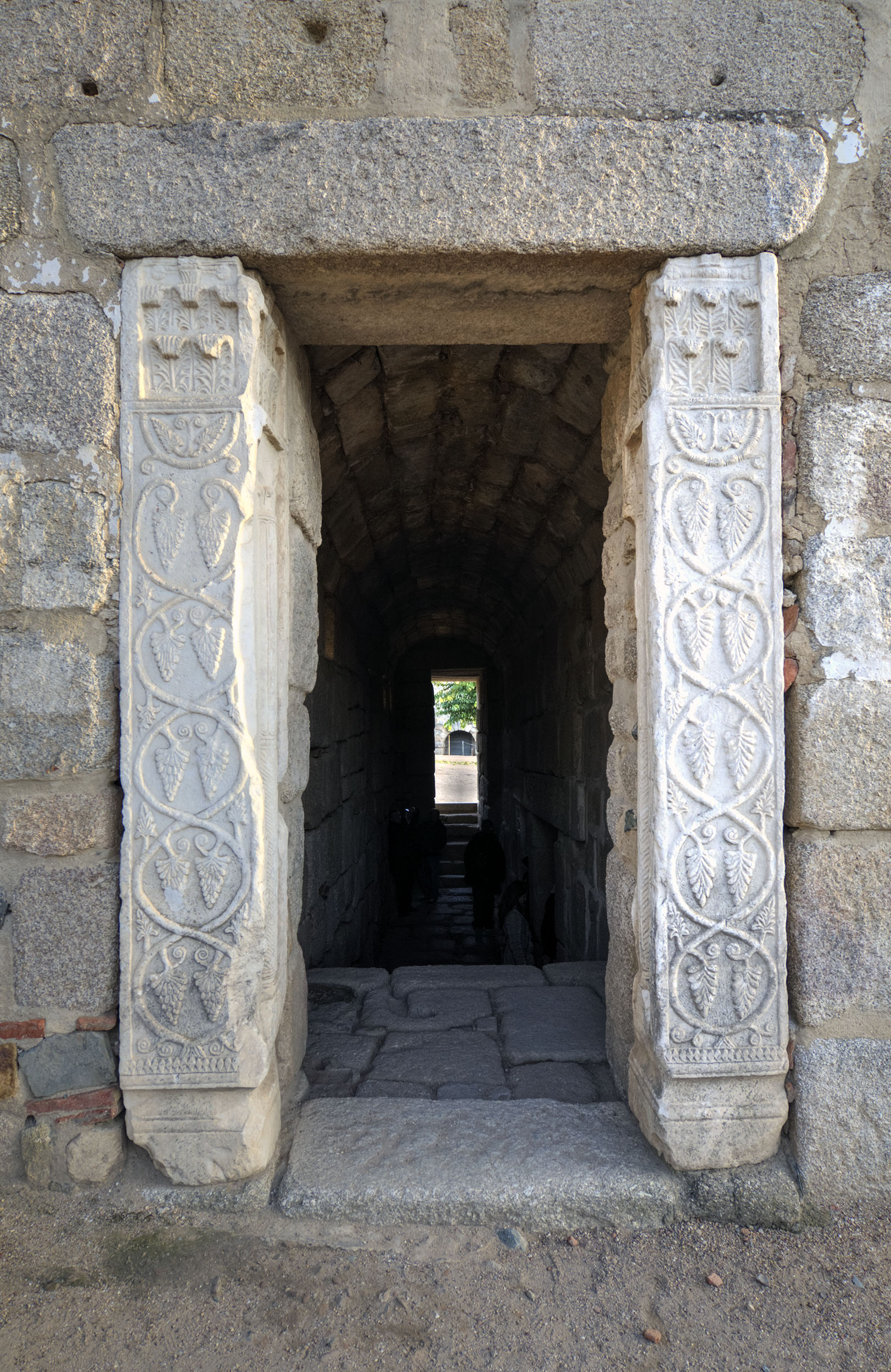 La alcazaba de Mérida fue construida en el año 835. Dentro del recinto hay un aljibe al que se accede por unas entradas y rampas adornadas con pilares y dinteles de origen visigodo.